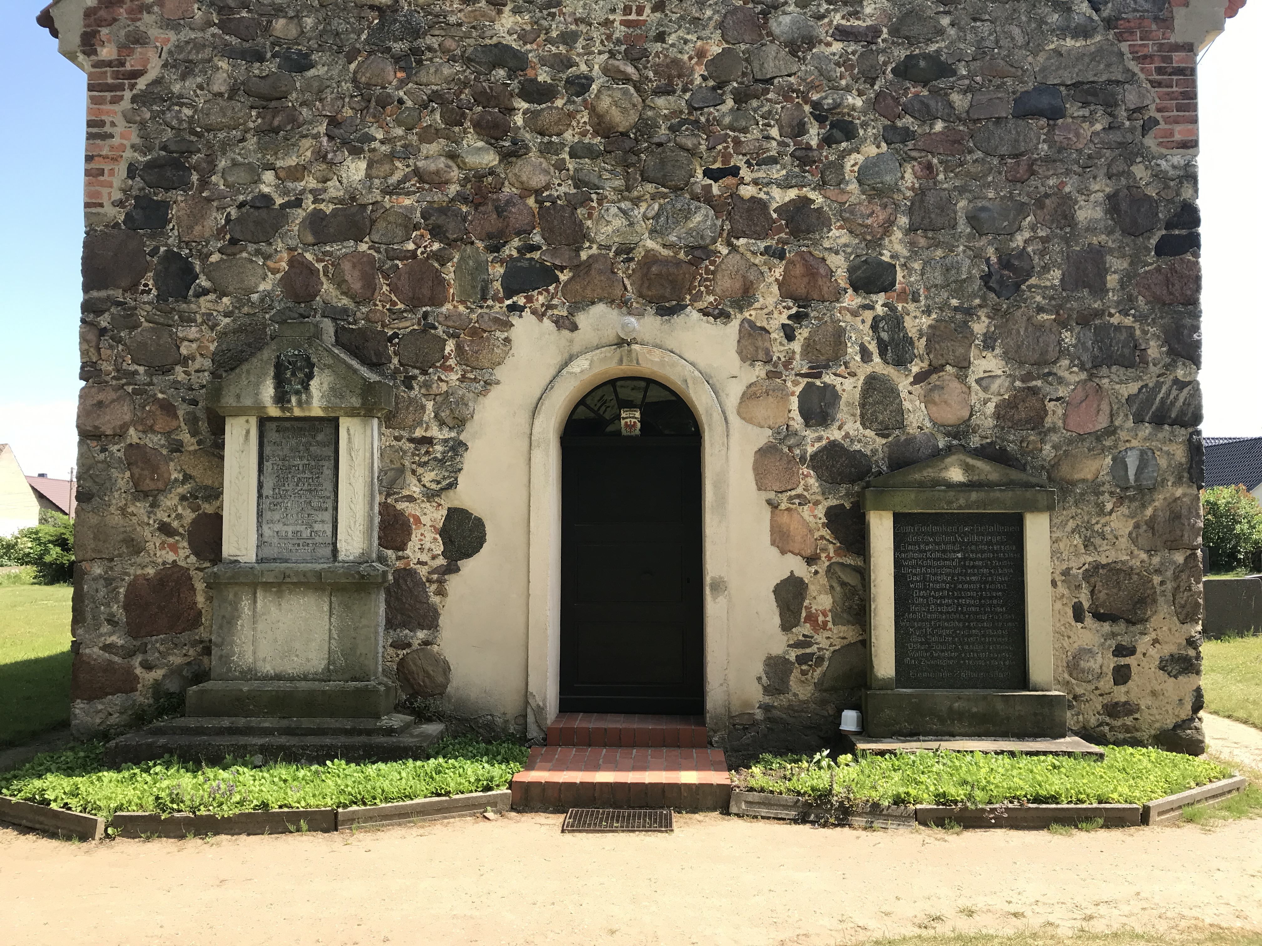 Die Dorfkirche in Zöllmersdorf der Stadt Luckau entstand um 1300 und wurde 1911 erheblich umgebaut.